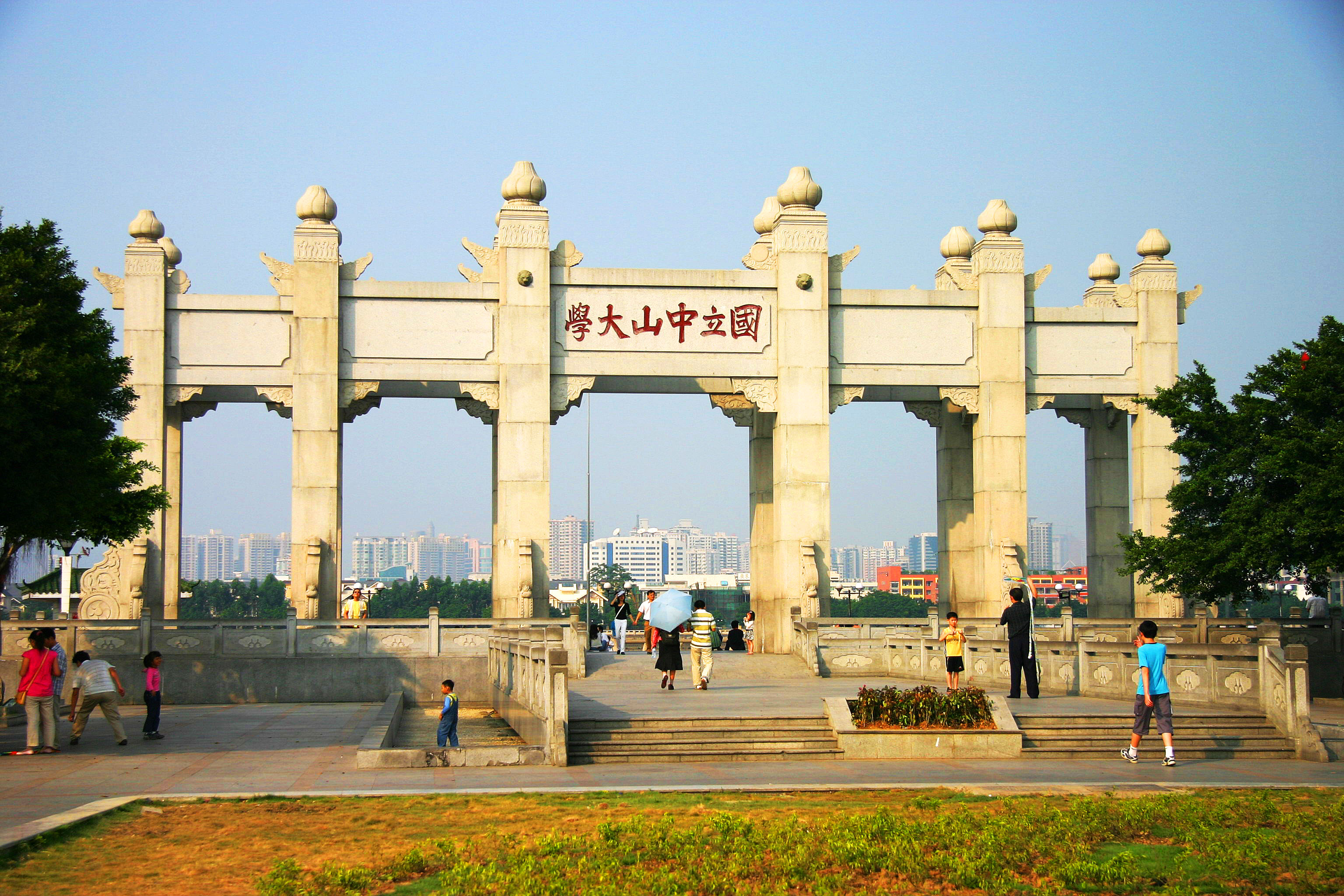 中大北门牌坊